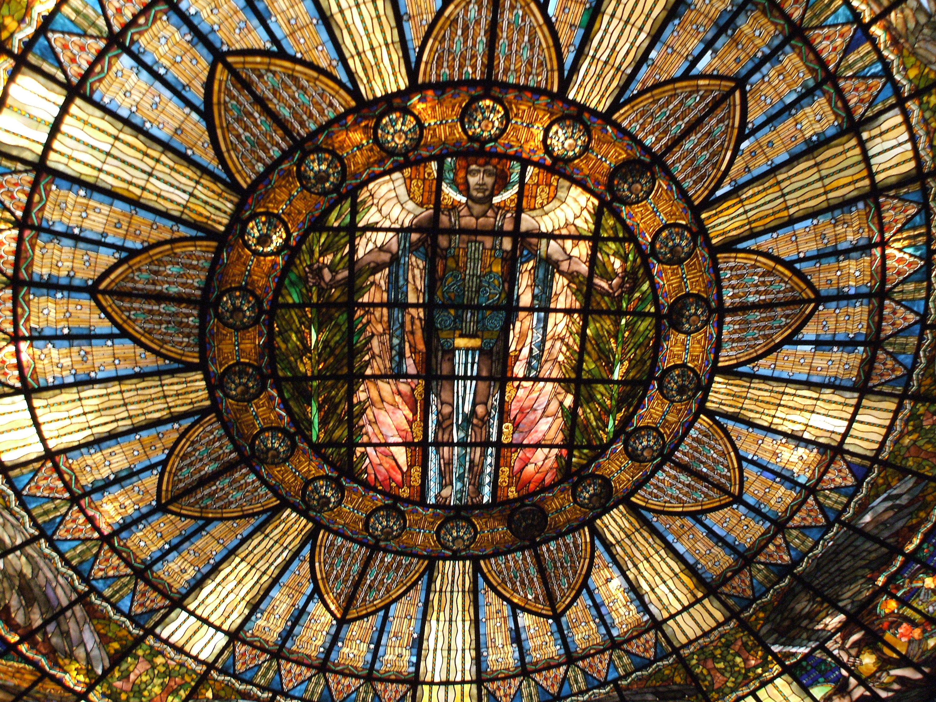 Vista interior del vitral del techo del Palacio de las Bellas Artes.